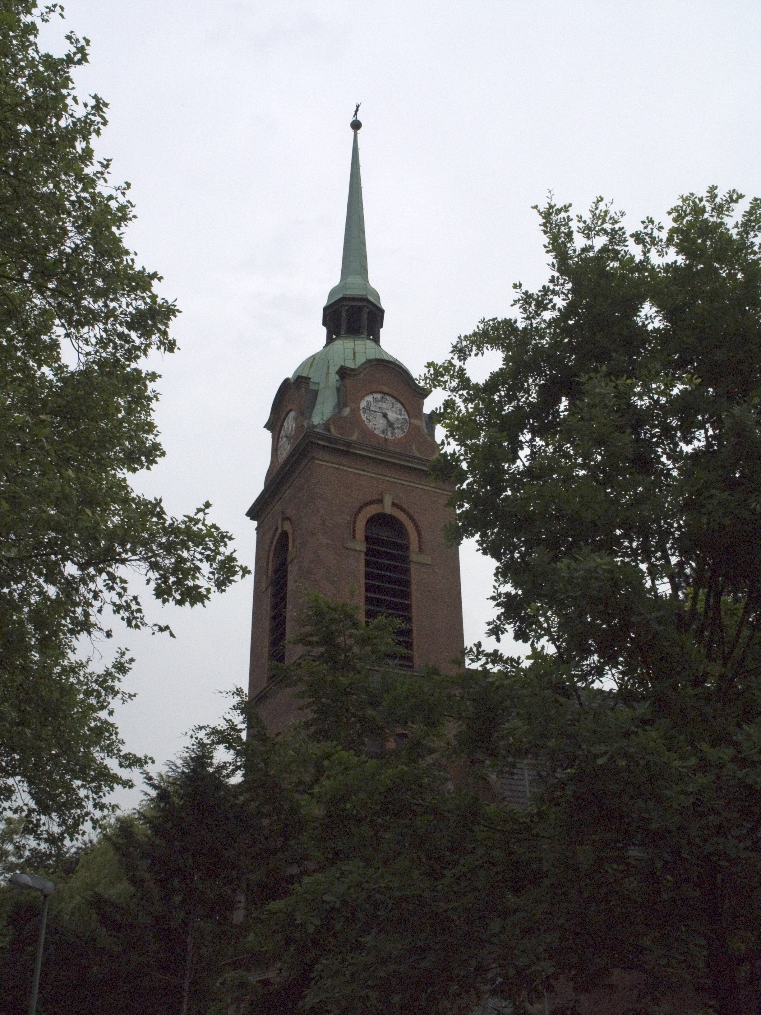 Северный Рейн - Вестфалия, Эссен – Alte Kirche в Крае